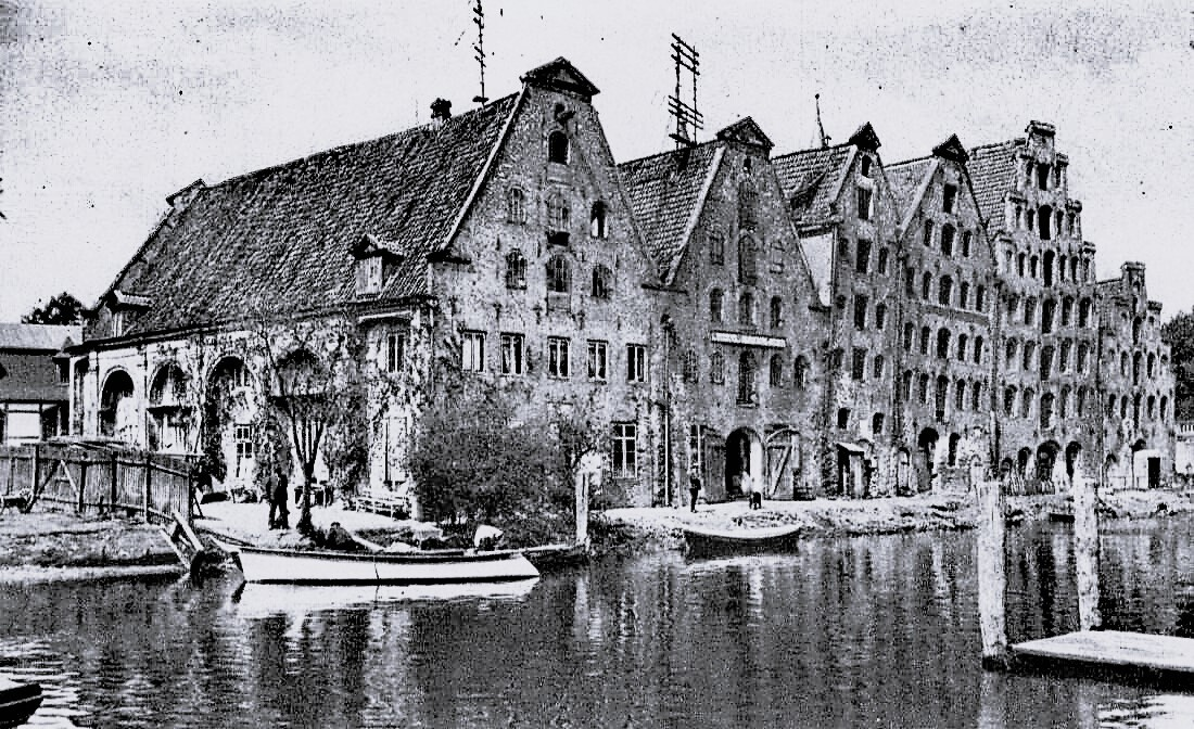 Die alten Salzspeicher an der Trave im Jahr 1919.